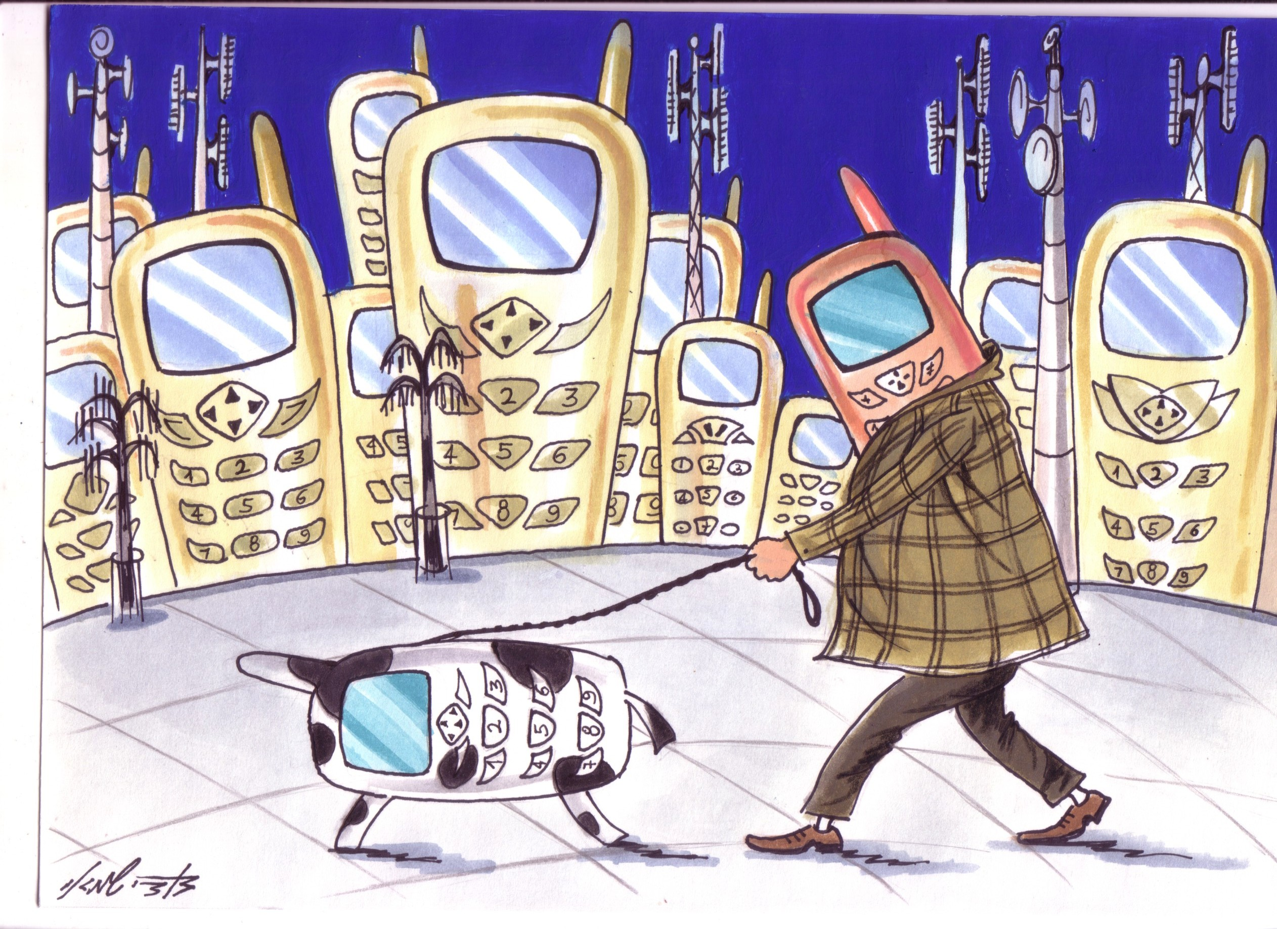 מדינת הפלאפונים